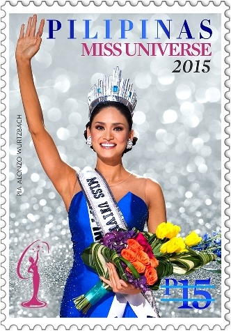 Pia Wurtzbach